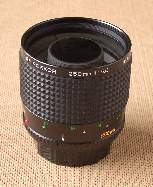 Spiegellinsenobjektiv RF 5.6/250mm fuer das Minolta-MC/MD-Bajonett